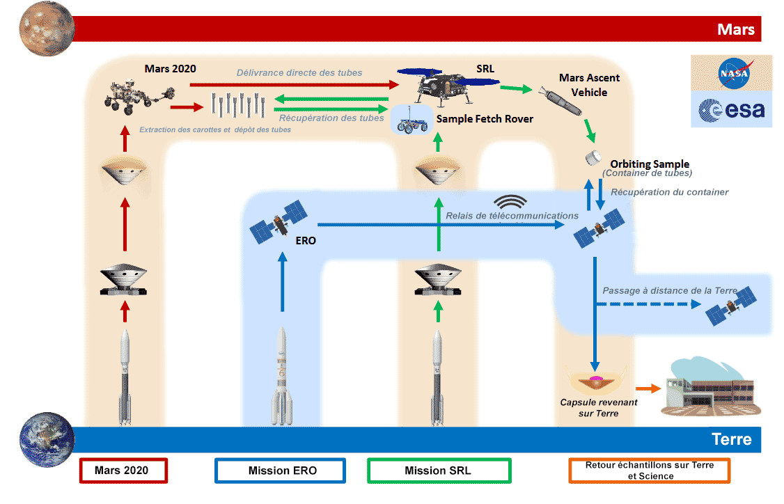 Déroulement du scénario de retour d'échantillons martiens 26-26-31